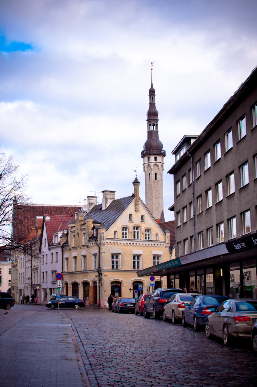 Harju tänav Tallinnas